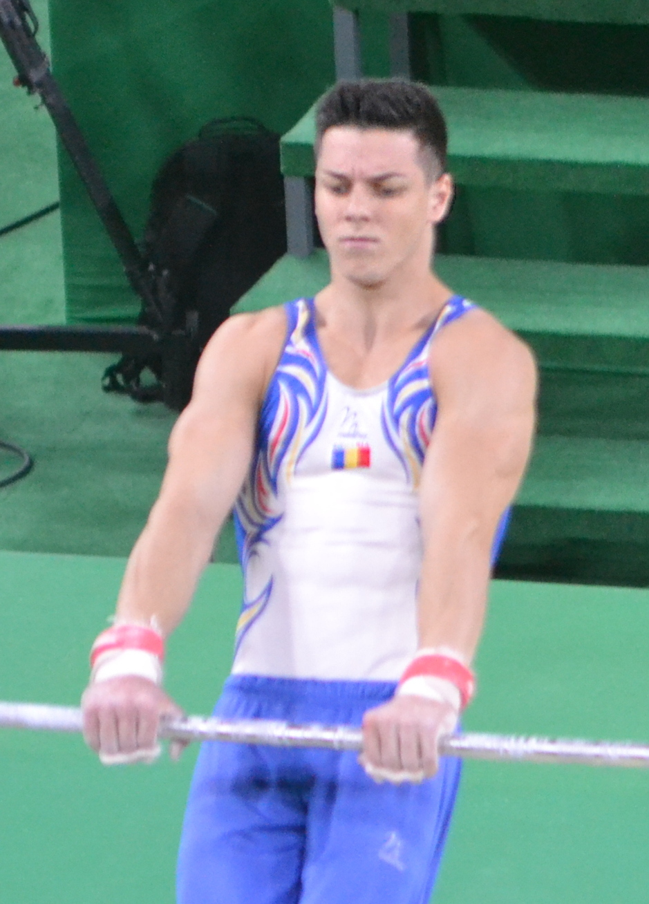 Andrei Muntean